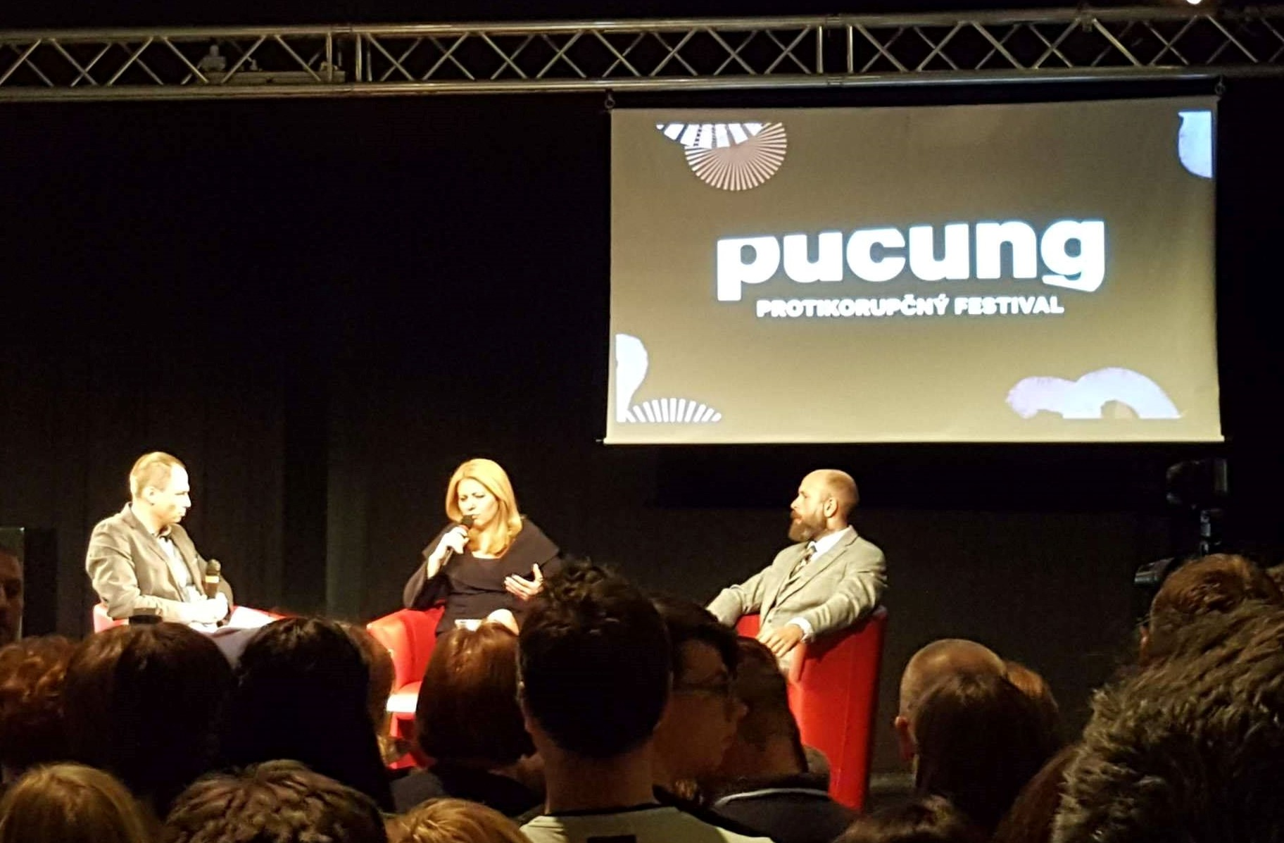 Zuzana Čaputová, protikorupčný festival Pucung v Košiciach. Debata Denníka N: Limity aktivizmu. Tabačka, 13. 4. 2019.